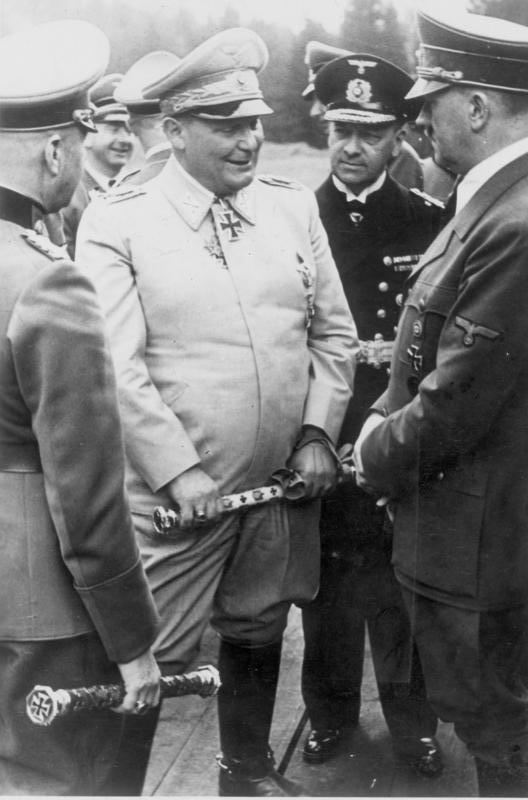 Scherl: Der Führer beging seinen 52. Geburtstag in seinem Hauptquartier, wo er über den Rundfunk die Glückwunschansprache des Stellvertreters des Führers Rudolf Hess und dann in Gegenmwart der Oberbefehlshabe aller drei Wehrmachtsteile die Glückwünsche der Front entgegennahm. UBz den Führer im Gespräch mit Reichsmarschall Hermann Göring, Generalfeldmarschall von Brauchitsch (links) und Generaladmiral Raeder. Scherl Bilderdienst (Bauer) "Fr" OKW 21.4.41 [Heraugabedatum] ADN-ZB 21.4.1941: Deutschland unter dem faschistischen Terrorregime 1933-45 Während Adolf Hitler seinen 52. Geburtstag im Hauptquartier beging, und die Glückwünsche der Oberbefehlshaber der drei Wehrmachtsteile entgegennahm, wurde von seinen Truppen das griechische Volk überfallen, das am 22.4.1941 kapitulieren musste. UBz: Hitler im Gespräch mit Reichsmarschall Göring, Generalfeldmarschall von Brauchitsch (links) und Großadmiral Reader (neben Hitler).